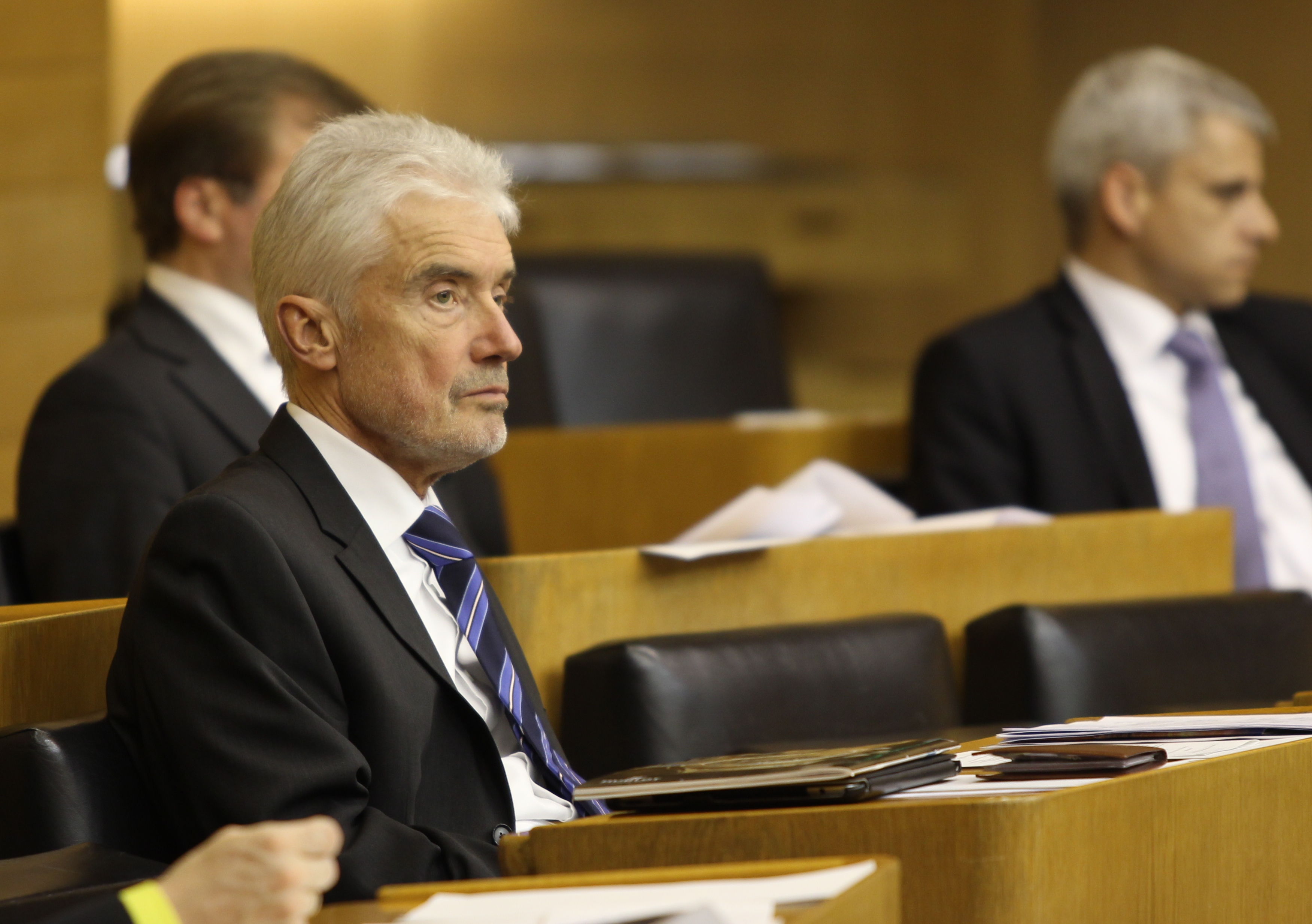 Ulrich Goll im Plenarsaal des Landtages von Baden-Württemberg. Wikipedia im Landtag – Baden-Württemberg 15.–16. Mai 2013 in Stuttgart Fragen zur Nachnutzung Wenn Sie Fragen zur Nachnutzung dieses Bildes haben, können Sie sich jederzeit gern an wenden Personality rights warningAlthough this work is freely licensed or in the public domain, the person(s) shown may have rights that legally restrict certain re-uses unless those depicted consent to such uses. In these cases, a model release or other evidence of consent could protect you from infringement claims.